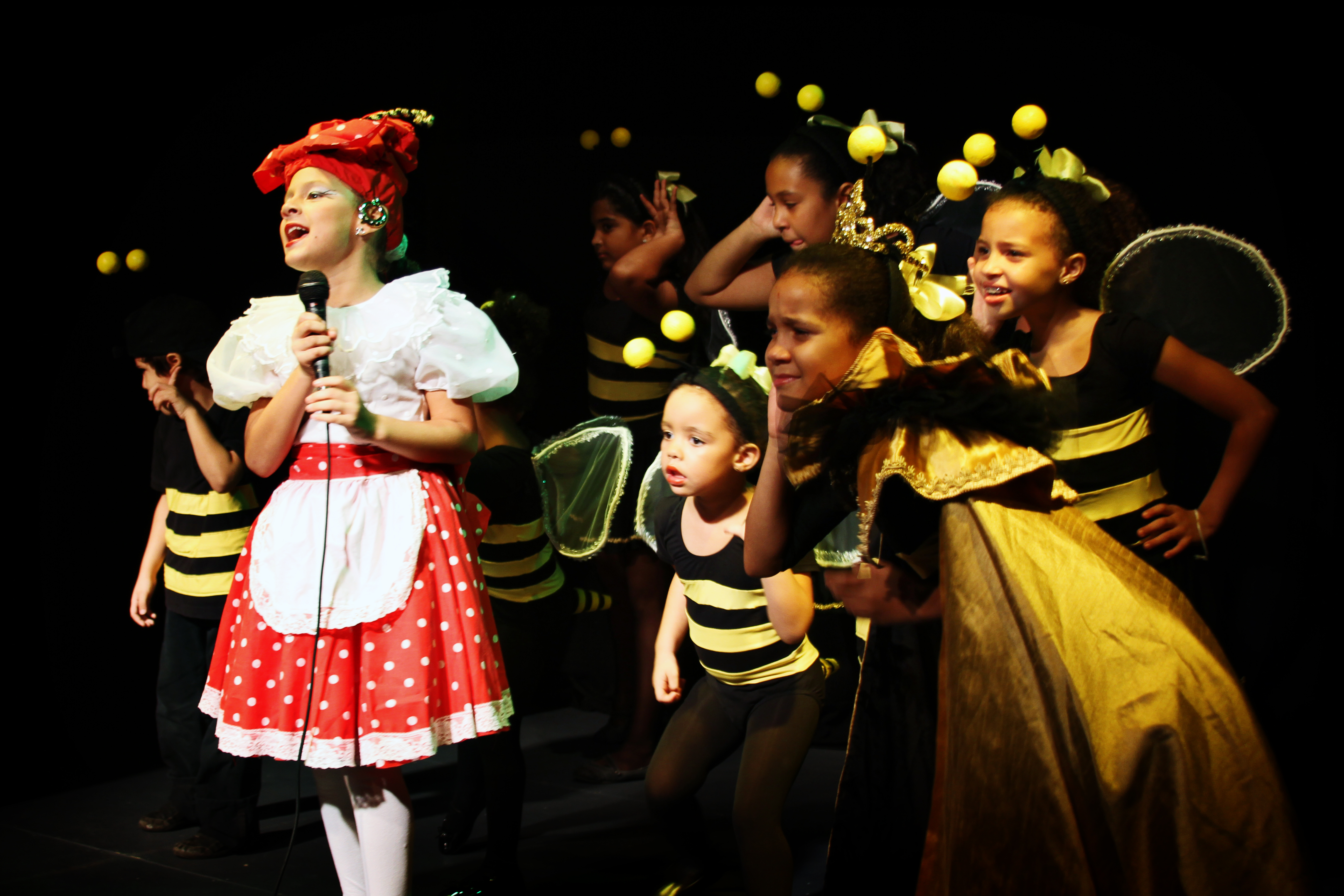 Obra: La Cucarachita Martina